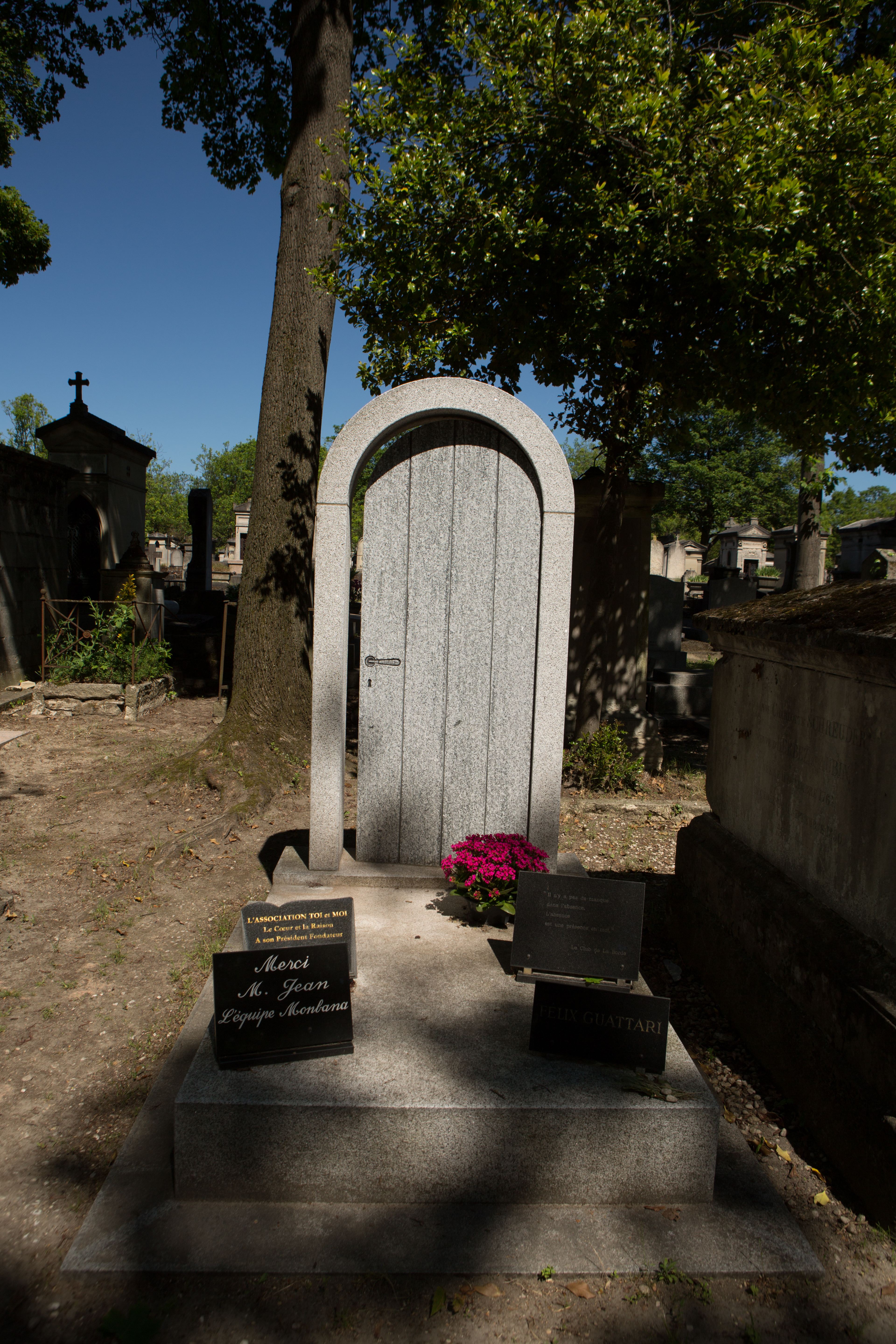 Sépulture de Félix Guattari (1930-1992), psychanalyste et philosophe.